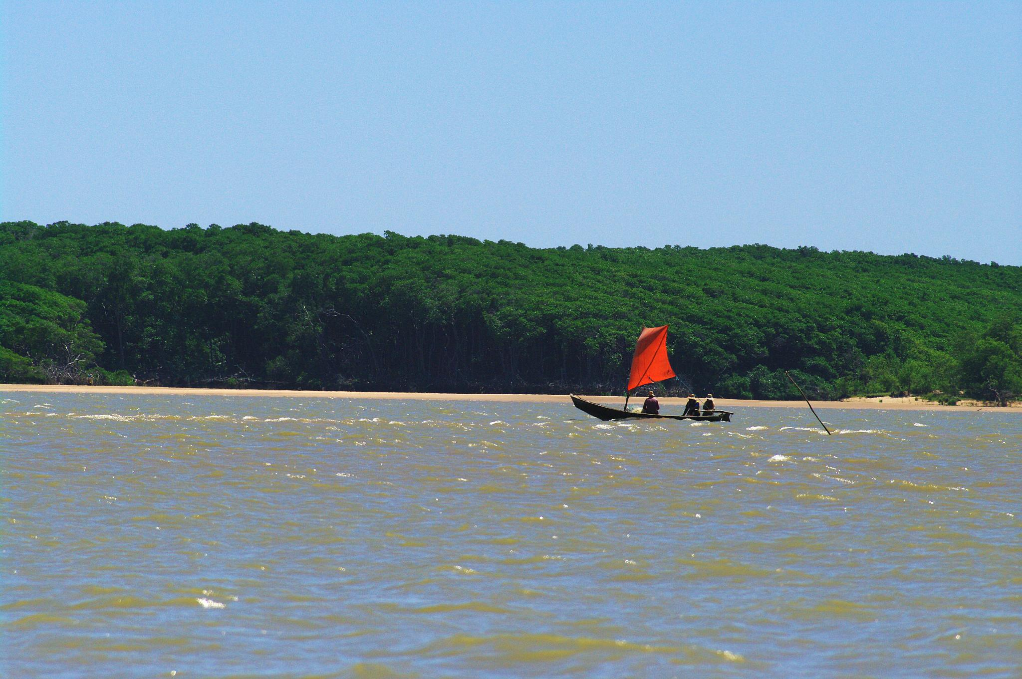 Rumo ao Pontal - divisa do Piauí com o Maranhão